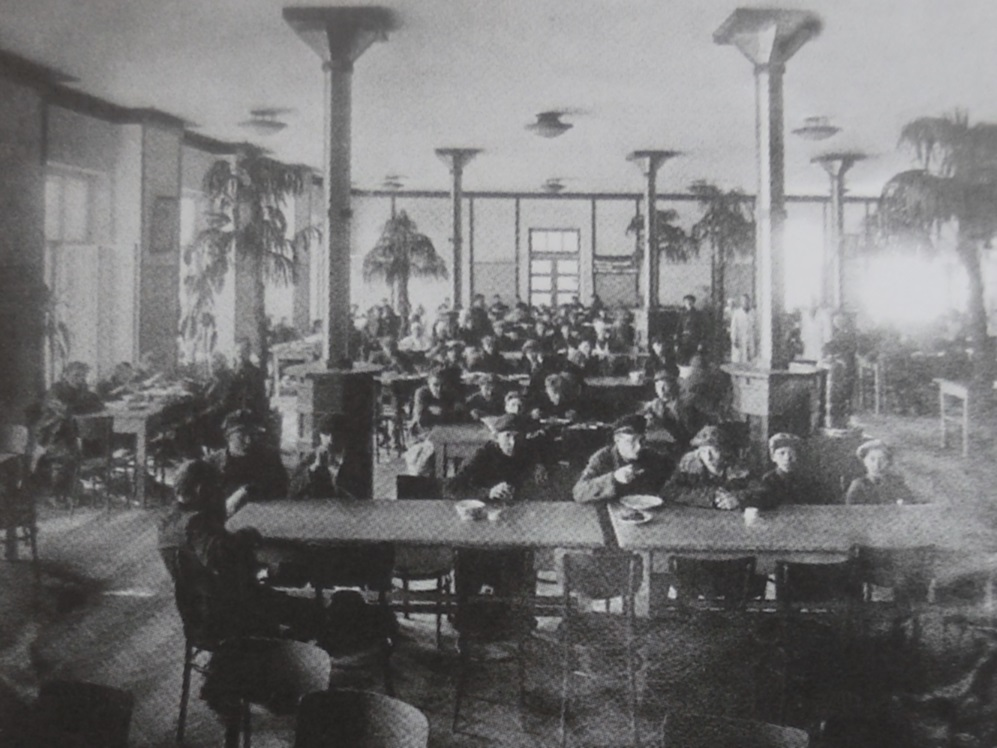 Зал фабрики-кухни. Фото конца 1920-х